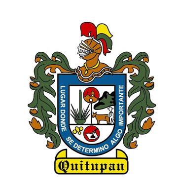 En el centro se aprecia la figura de un maguey con un quiote, el cual se considera origen del nombre del municipio; también se plasmó a un campesino labrando la tierra, ya que Quitupan es netamente agrícola, ganadero y forestal, por lo cual también se contempló una montaña con bosque.